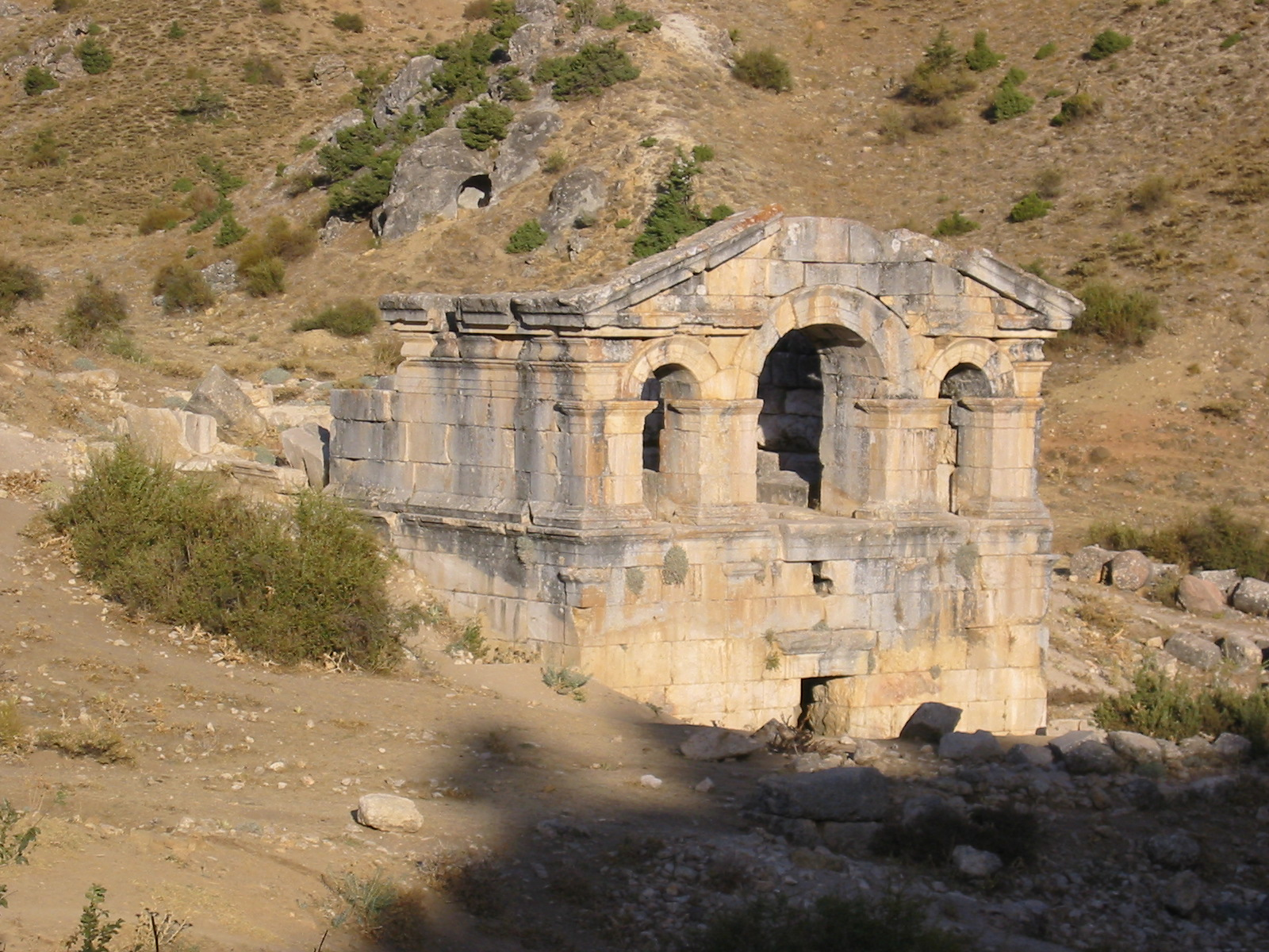 Şar (Comana) in Tufanbeyli, Adana, Turkey